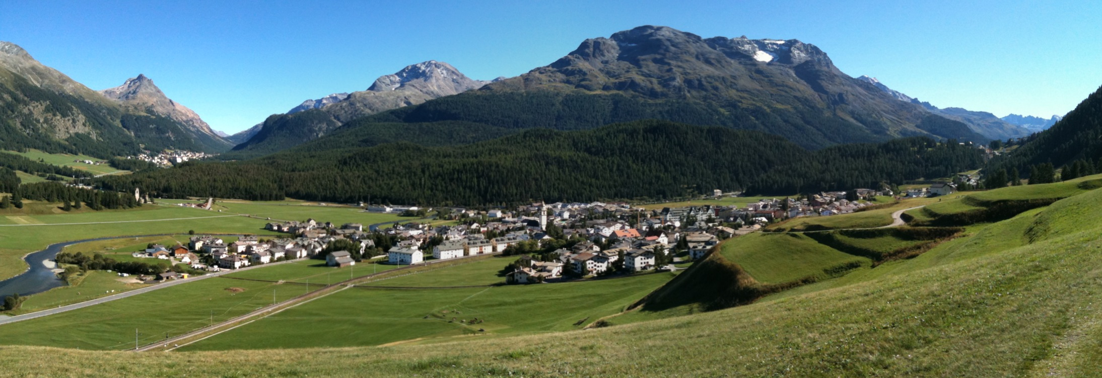 Panorama von Celerina / Schlarigna, von Richtung Samedan aus gesehen